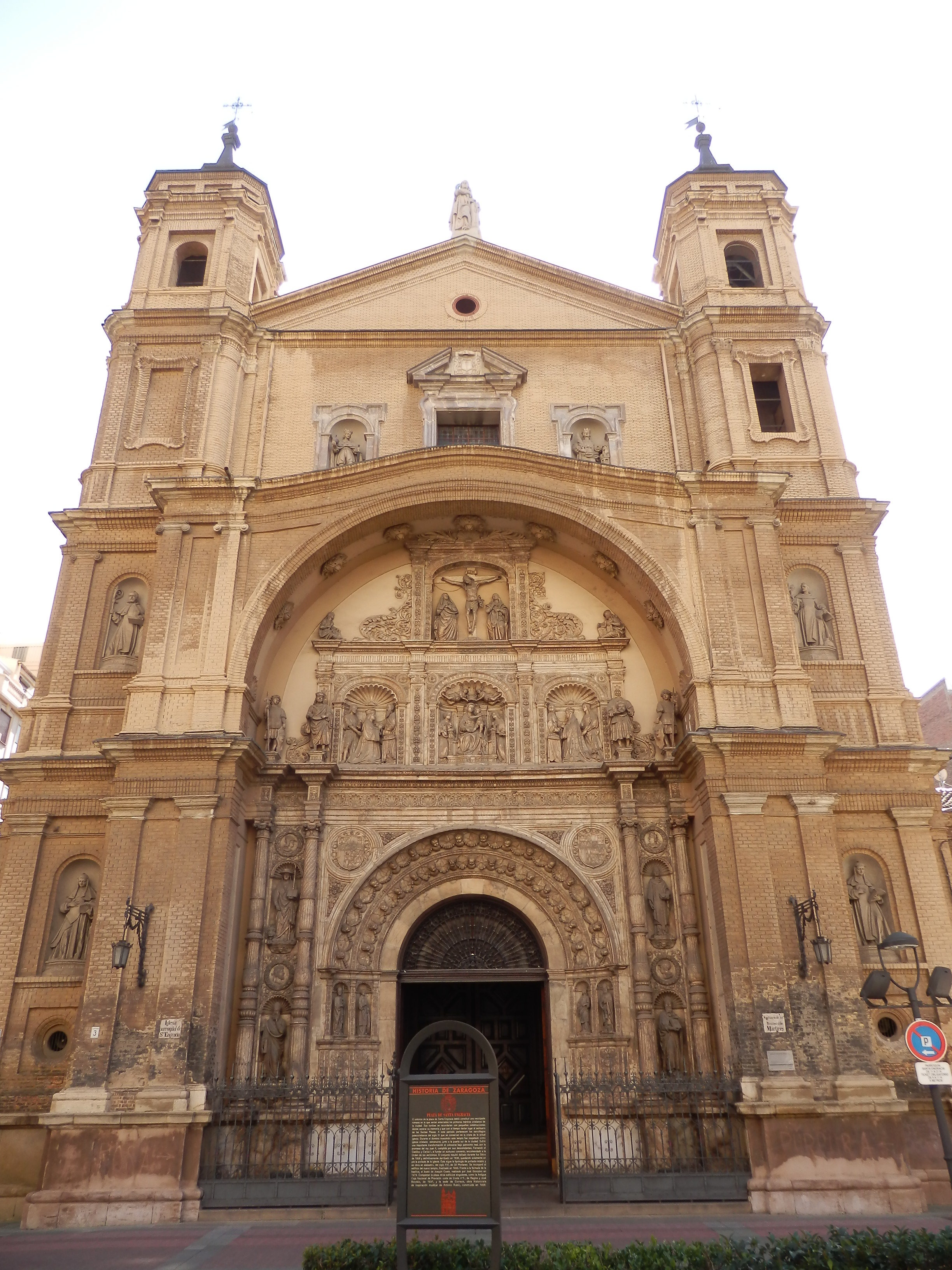 Portada de la Iglesia de Santa Engracia de Zaragoza.